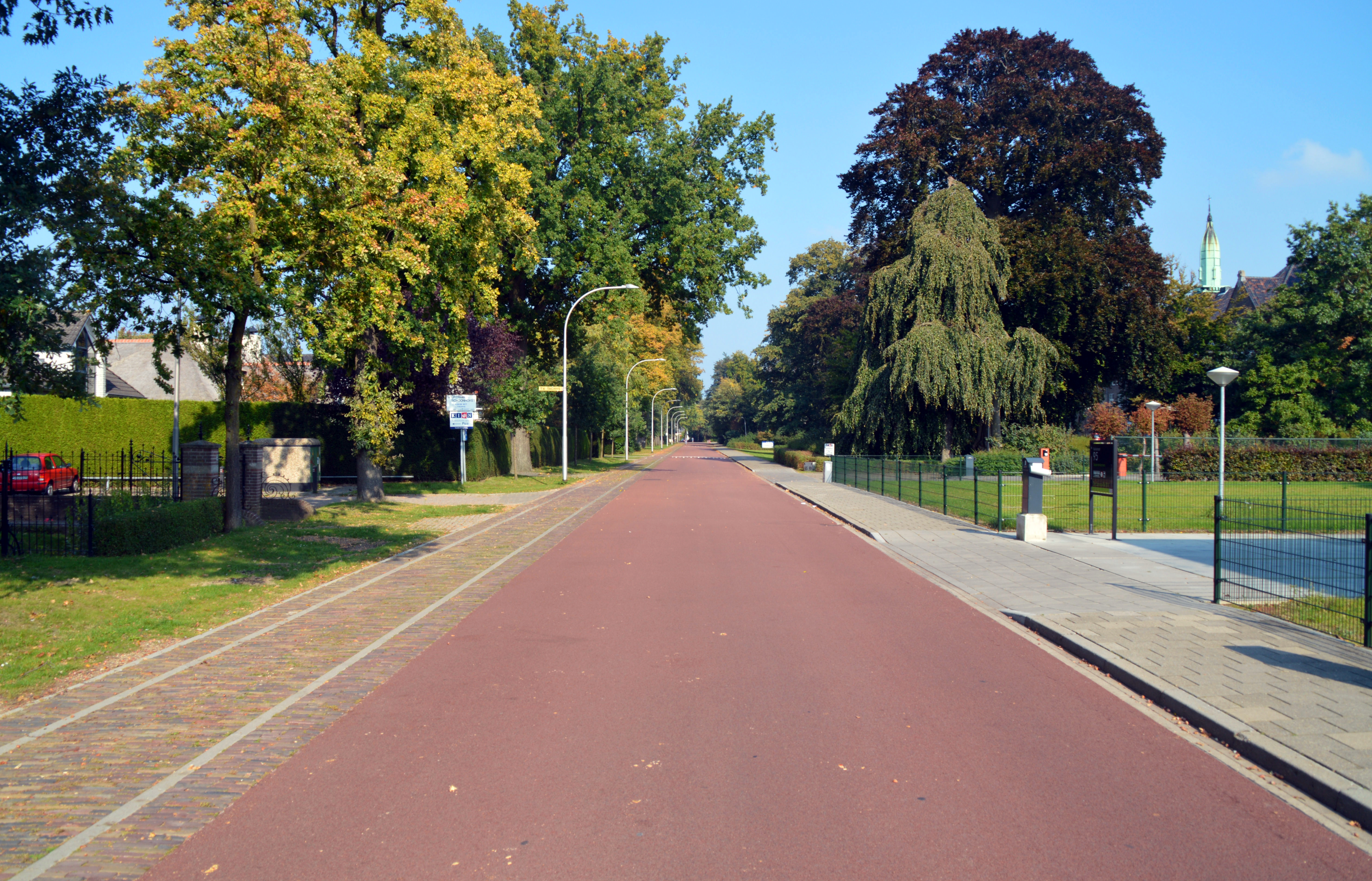 Kerkstraat Zuid Hees Nijmegen